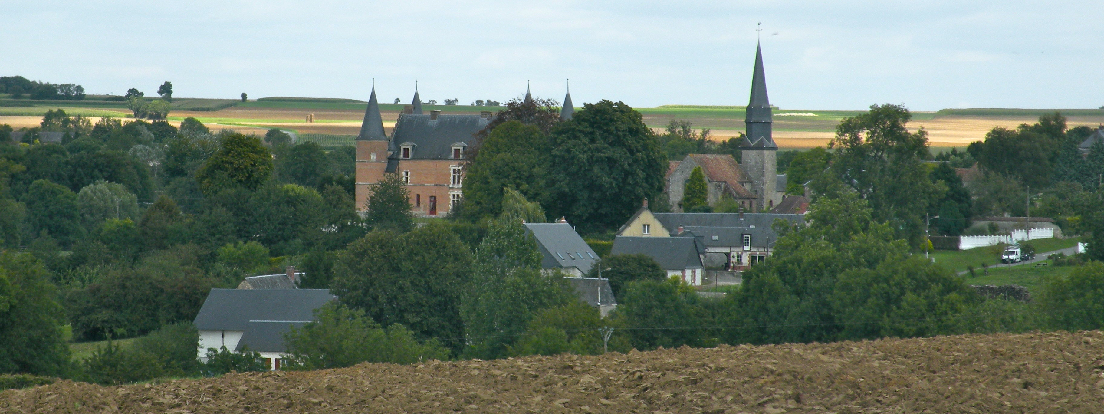 vue sur Hannaches